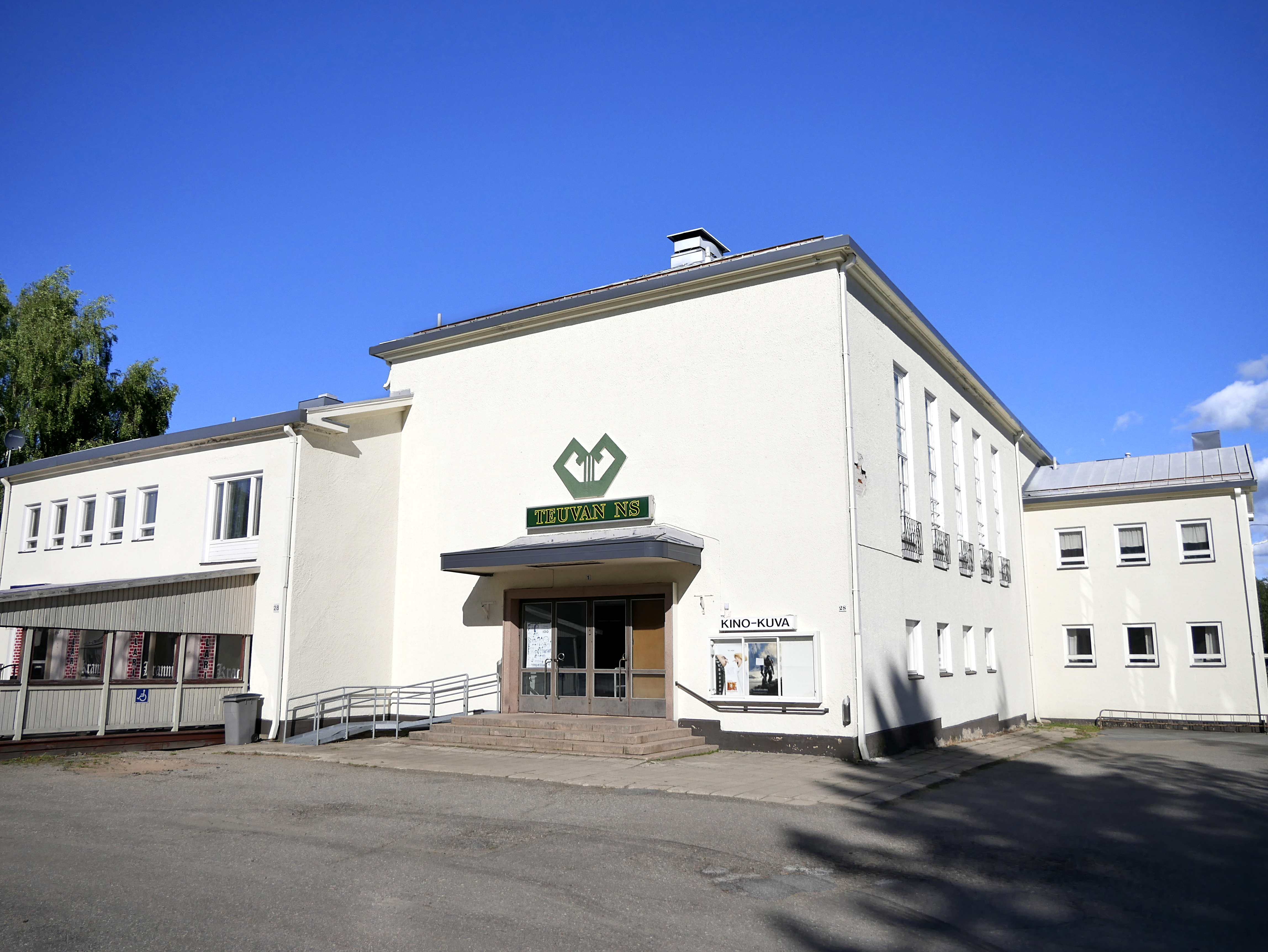 Teuvan nuorisoseura.